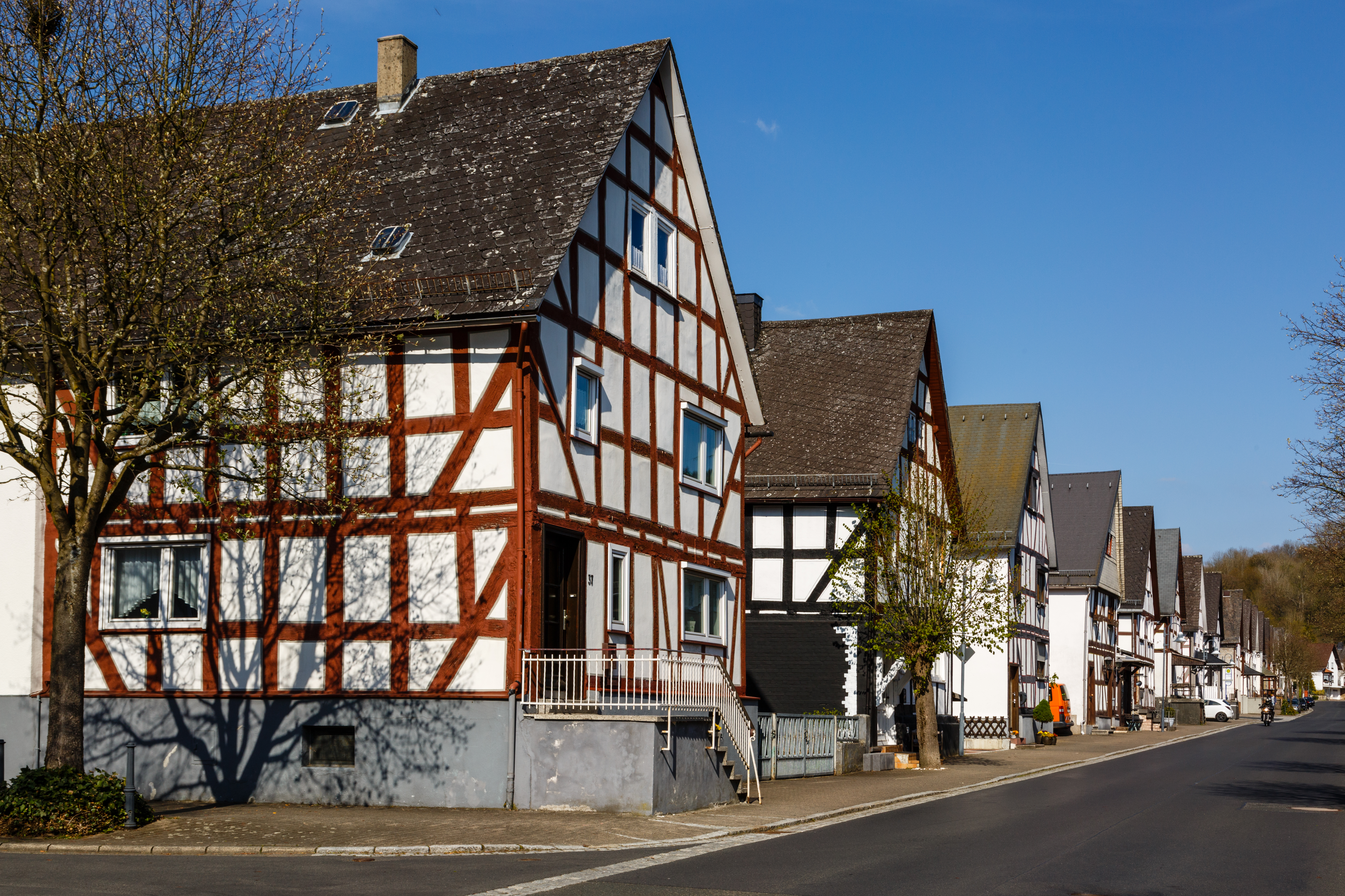 Nanzenbach - Historischer Ortskern